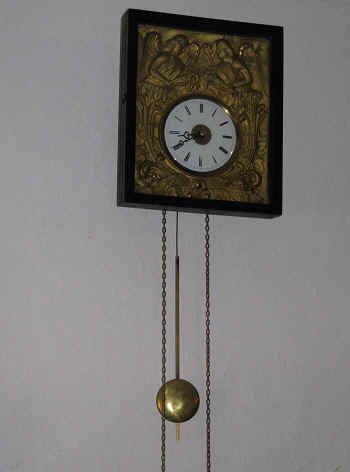 Ura v hiši v Prešernove rojstne hiše v Vrbi na Gorenjskem. Quelle: eigene Aufnahme 19 08 2005 Fotograf: Janez Novak, Ljubljana, Slovenija